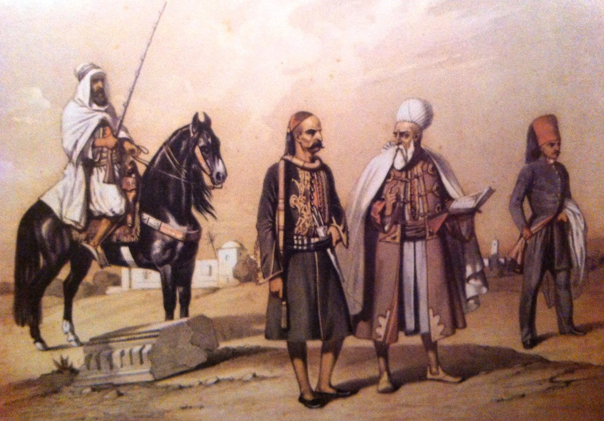 Gravure montrant, de gauche à droite, un hamba (gendarme tribal), un soldat irrégulier turc, un scribe hanéfite et un garde mamelouk du bey